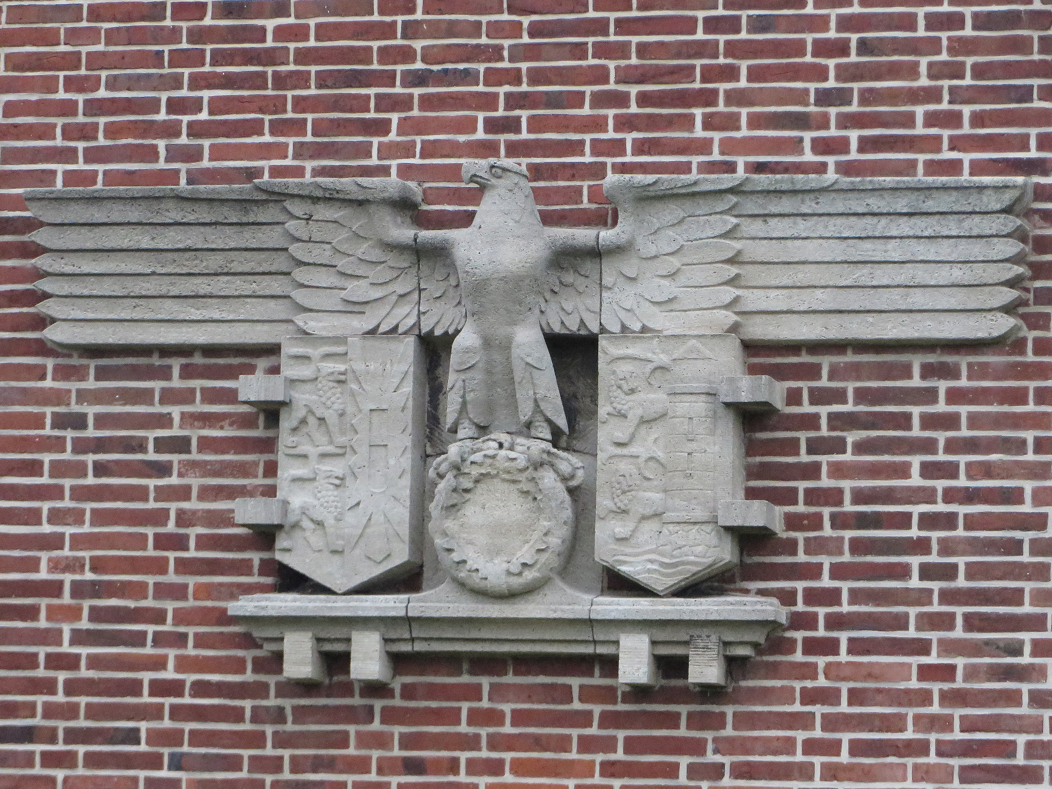 Reichsadler der Marinesportschule (Jan 2015, anderes Bild}; Hakenkreuz wurde entfernt.